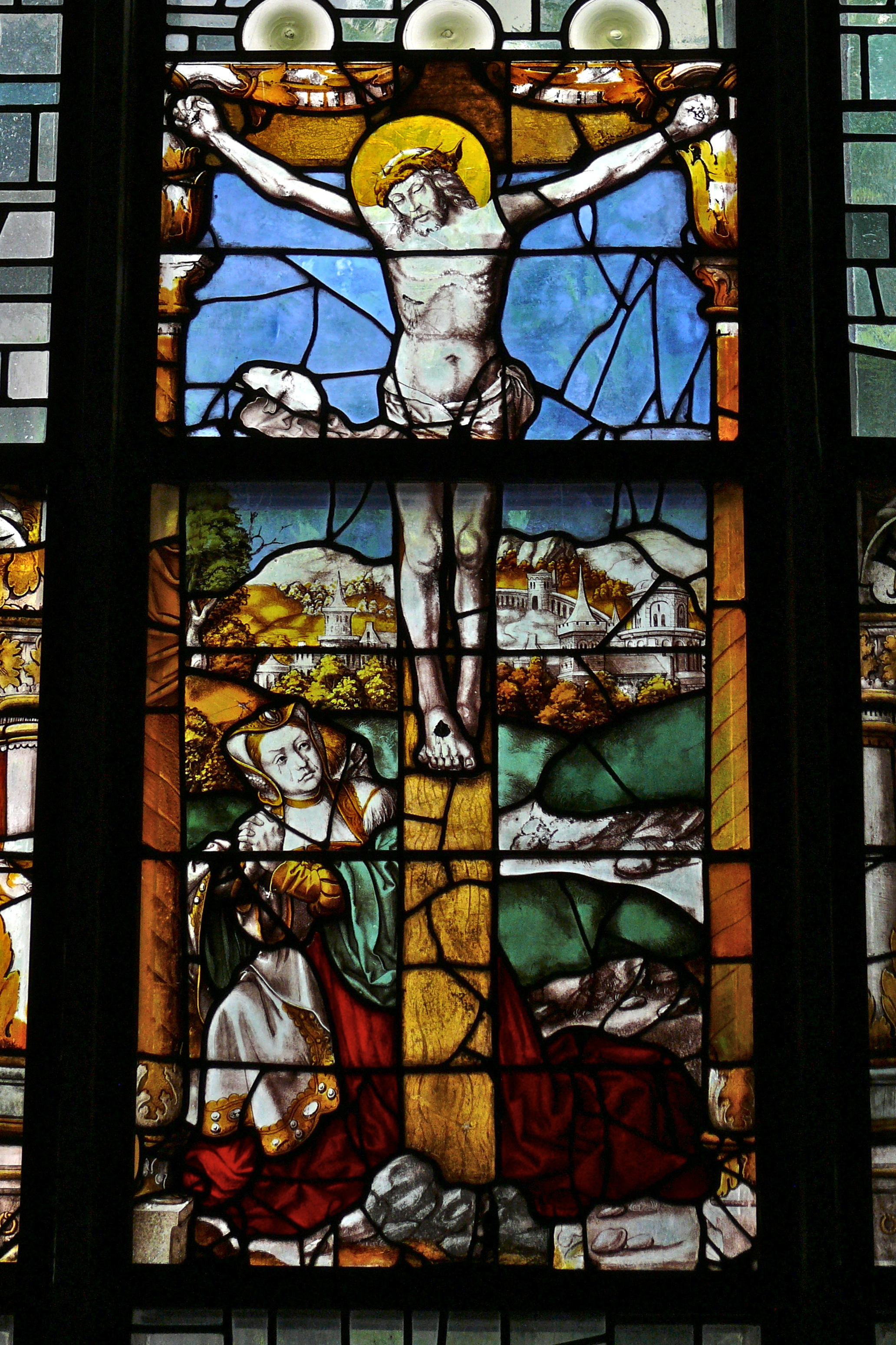 Kreuzigung Christi, Glasgemälde in St. Maria Lyskirchen in Köln, ca. 1520/30